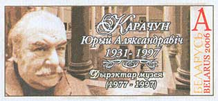 Марка Республики Беларусь «75 лет со дня рождения Ю. А. Карачуна», выпущенная издатцентром «Марка» РУП «Белпочта» 27.12.2006